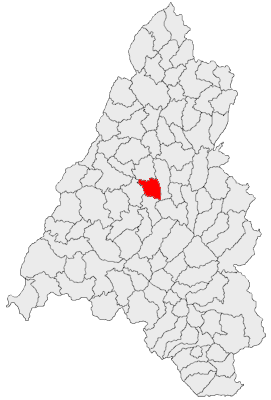 Categorie:Hărţi ale judeţului Bihor